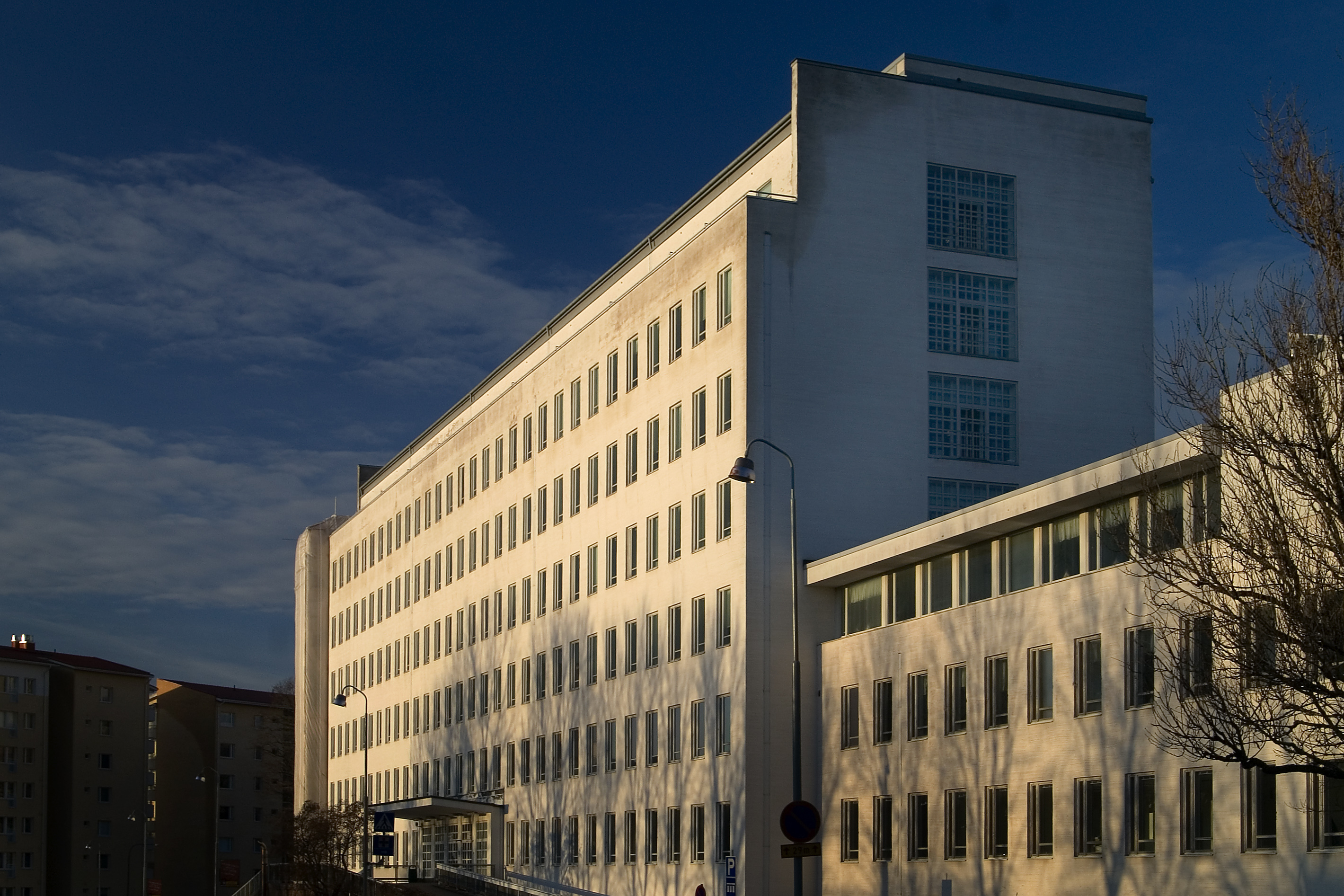 TYKSin A-sairaala ja B-siipi. Arkkitehdit Jussi Paatela & Uno Ullberg, 1937–1938.